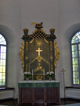 Altartavlan i Malungs Församling